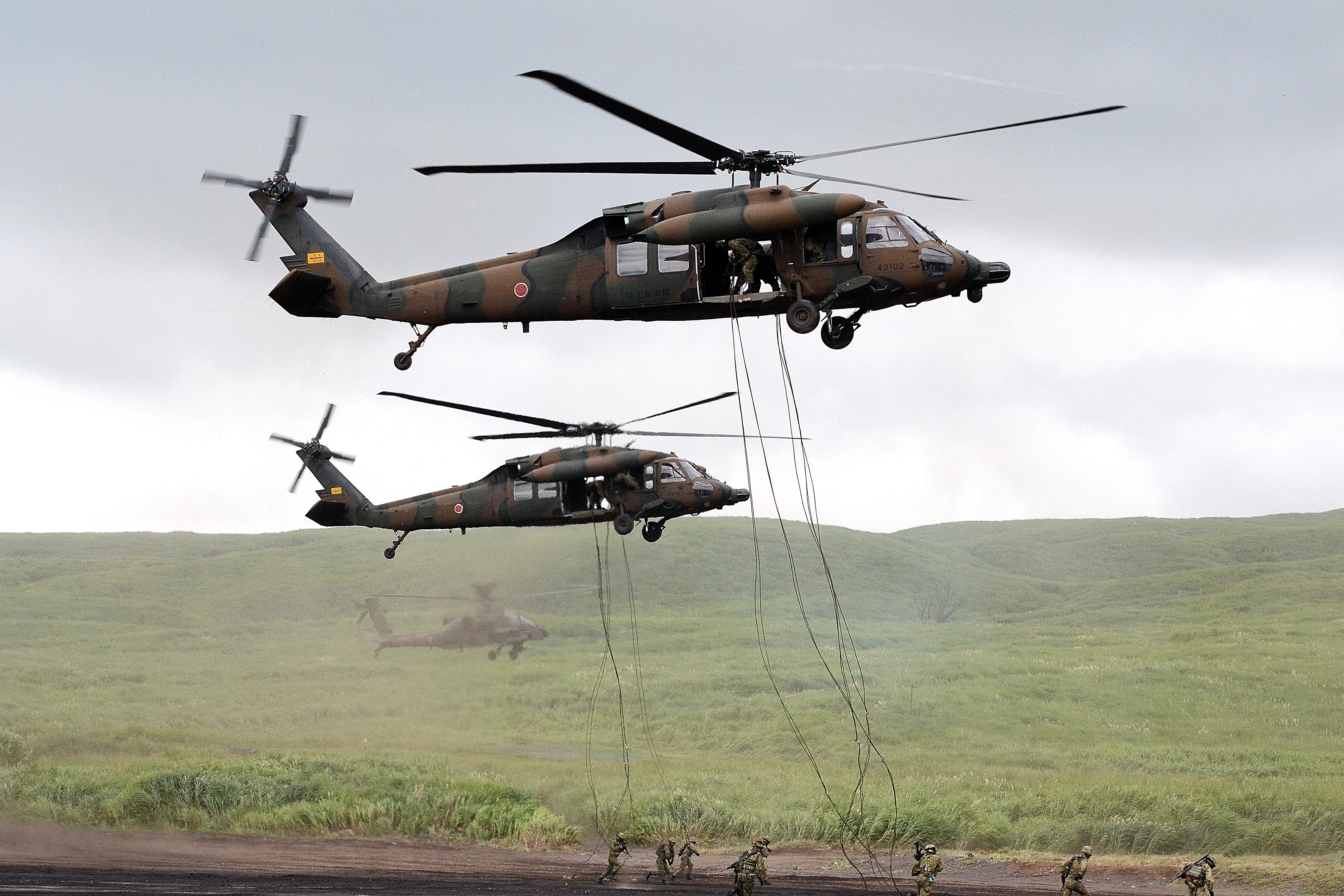 陸上自衛隊のUH-60JAとそこからロープを使用して地上に降下した後に行動する自衛隊員（2015年の東富士演習場で行われた富士総合火力演習において撮影）